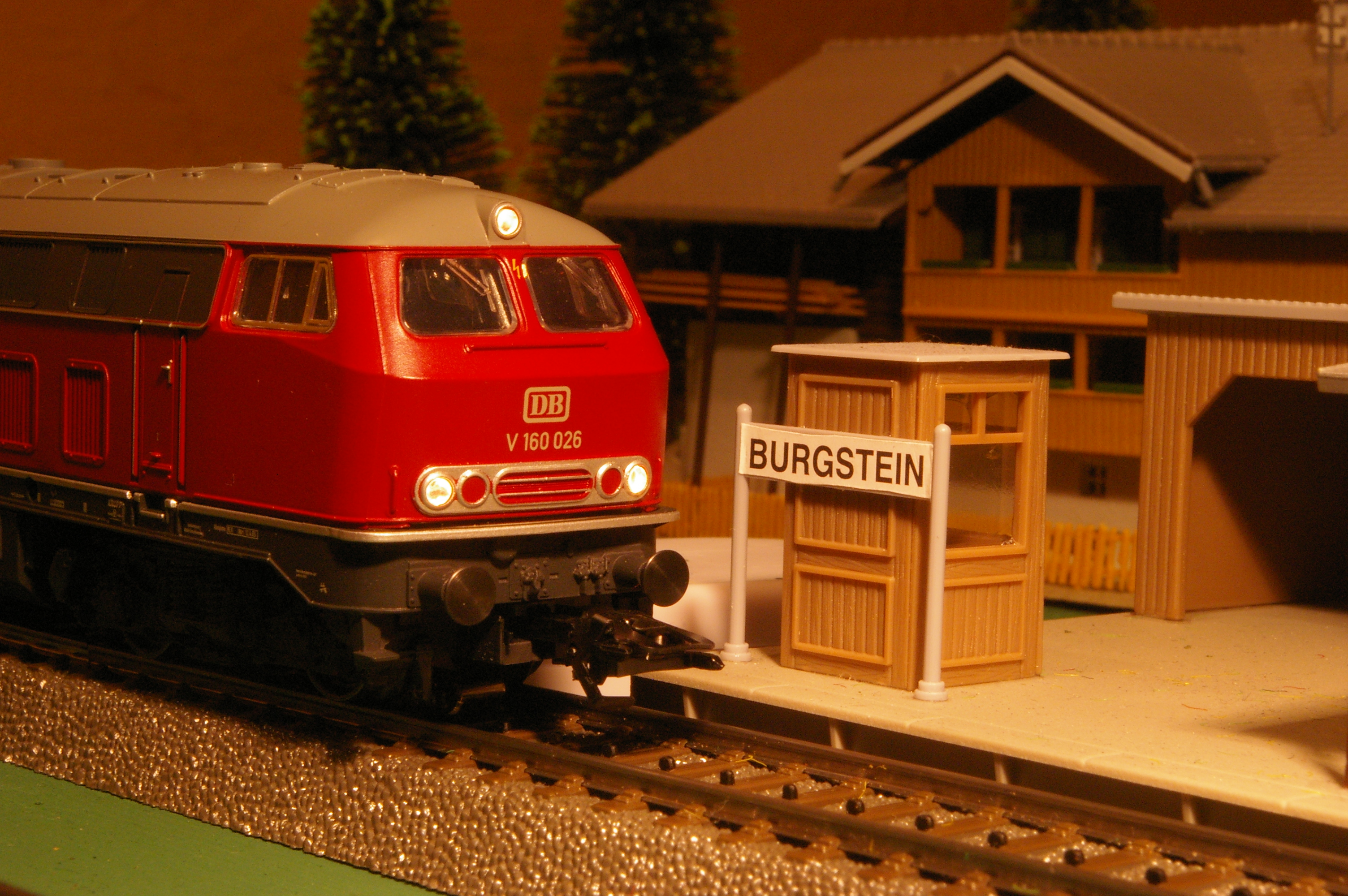 Märklin H0 Diesellok V160 aus Startpackung 29825